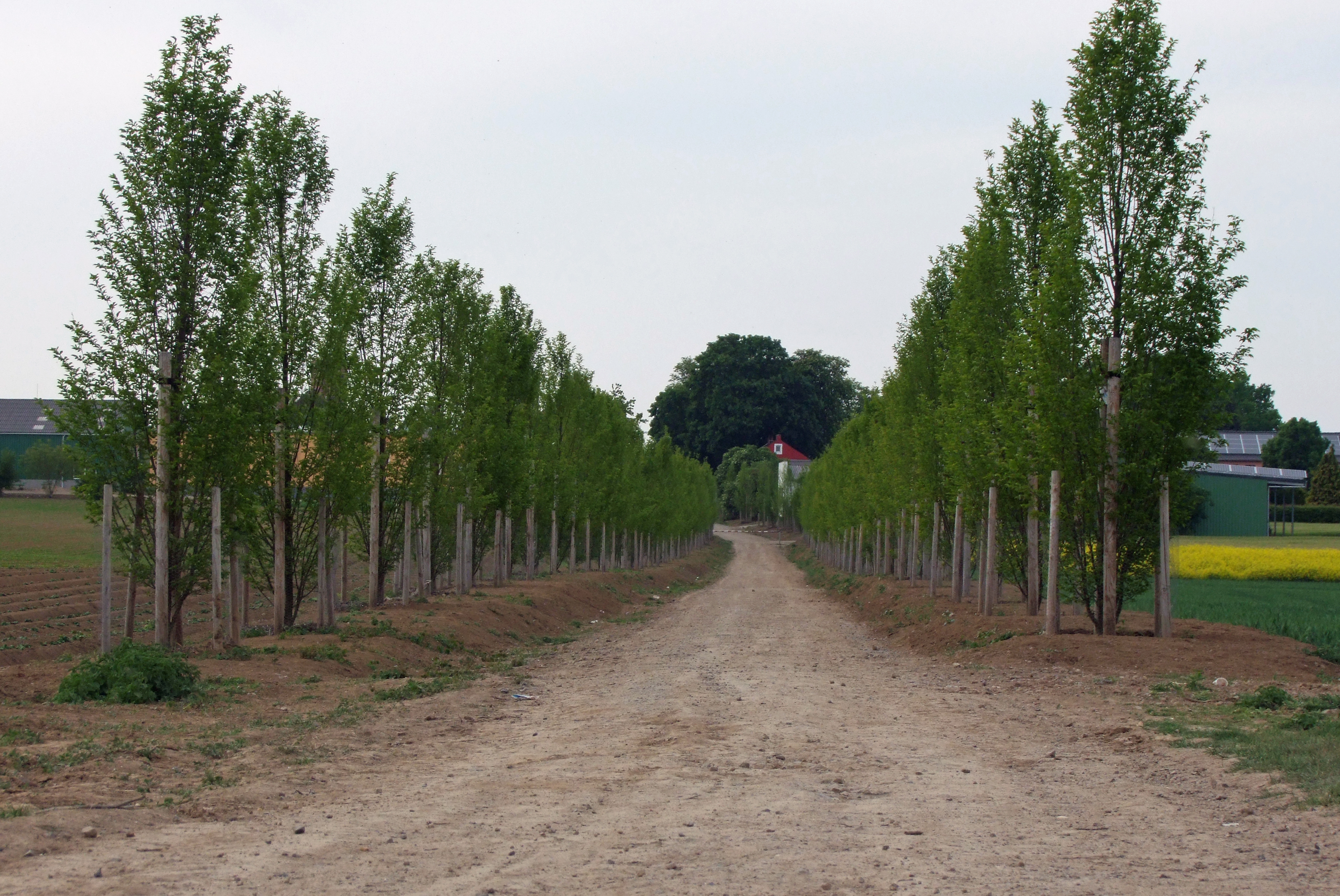 Blick vom Zülpicher Wassersportsee auf die Kernstadt durch die neue Allee